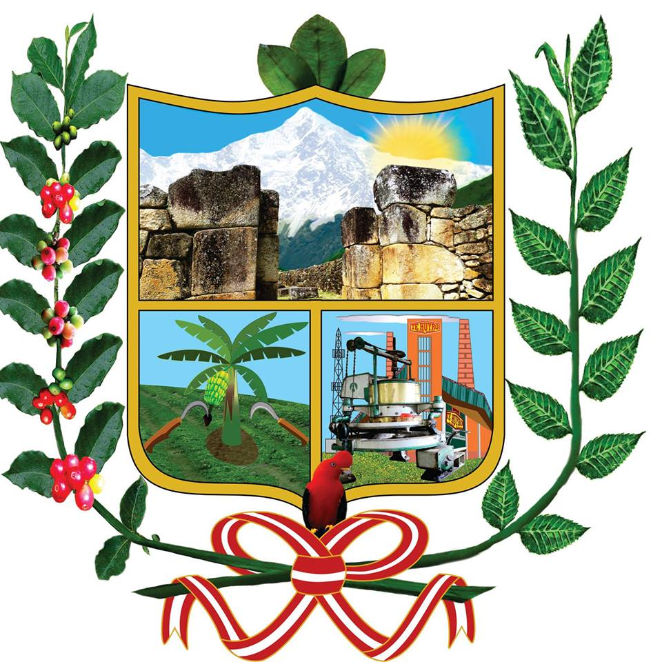 Escudo Distrital de Huayopata